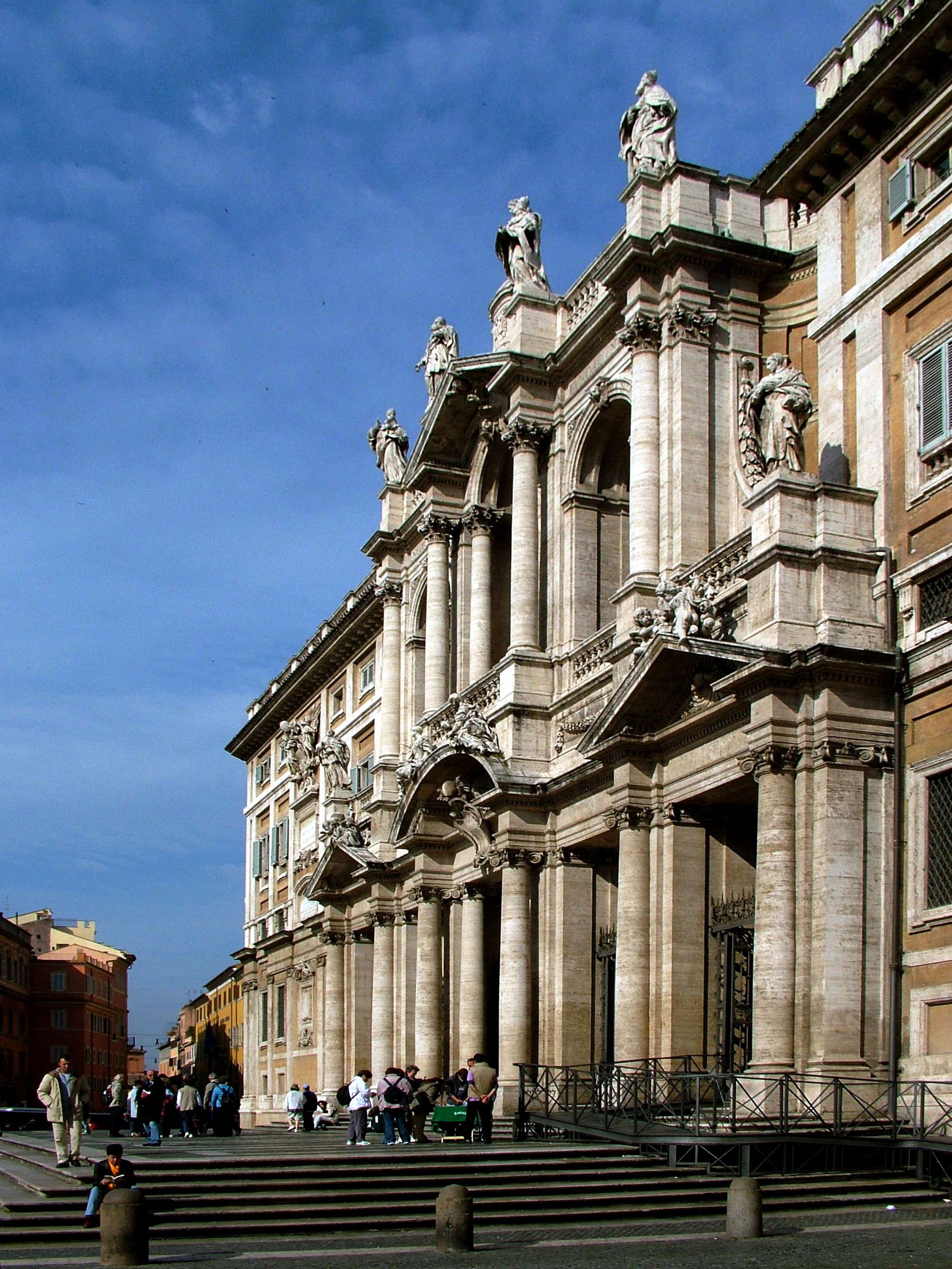 Basilica di Santa Maria Maggiore (Róma), a plasztikus főhomlokzat oldalnézete